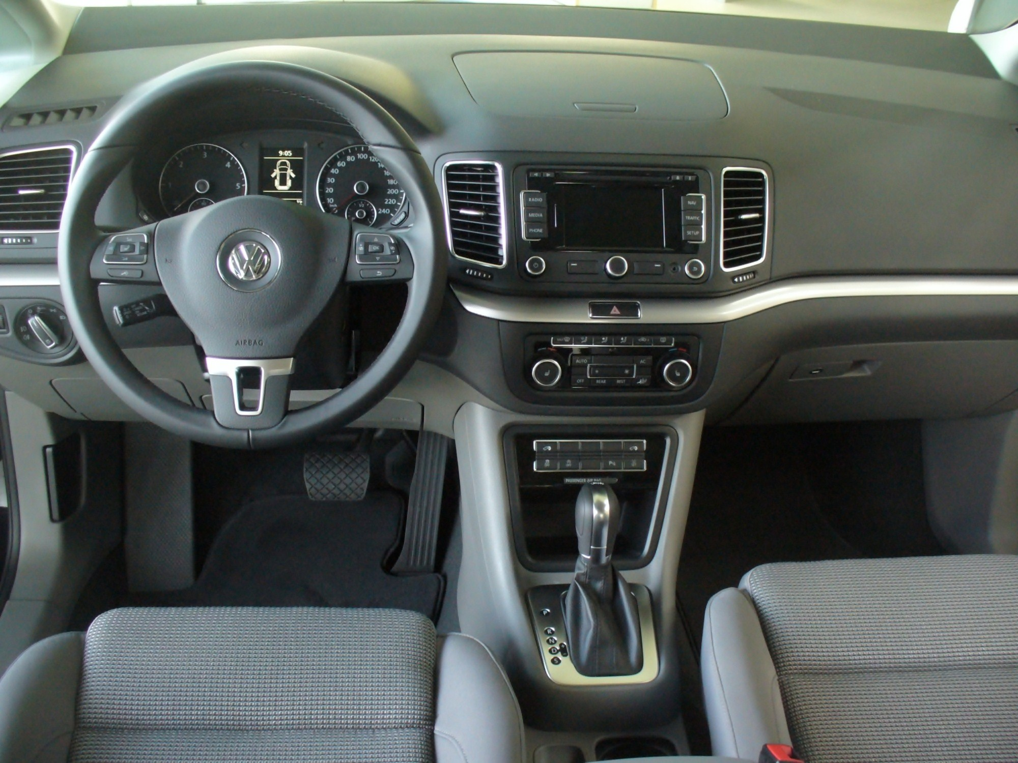 VW Sharan II